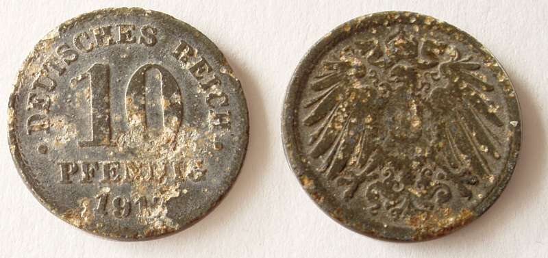 Deutsches Reich, 10 Pfennig, 1917, d=21 mm, 3.5 gramm, zincproduced from 1917-1922